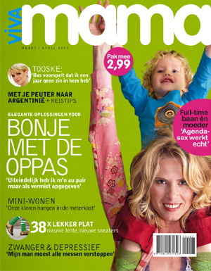 Gemaakt en geplaatst door Viva